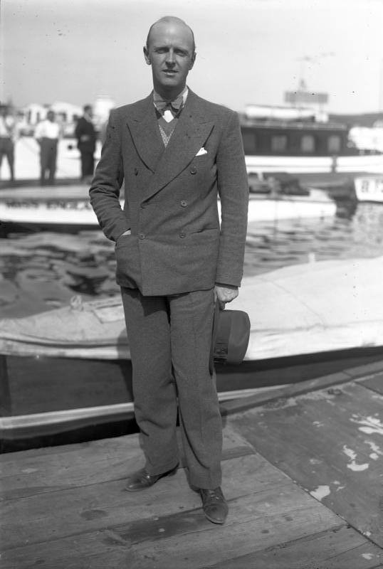 Weltrecordfahrer Major Sir Henry Segrave tödlich verunglückt ! Zivilaufnahme des tödlich verunglückten Major Sir Henry Segrave Information added by Wikimedia users.Original caption: "Bundesarchiv, Bild 102-09946Foto: o.Ang. I Juni 1930" — removed caption